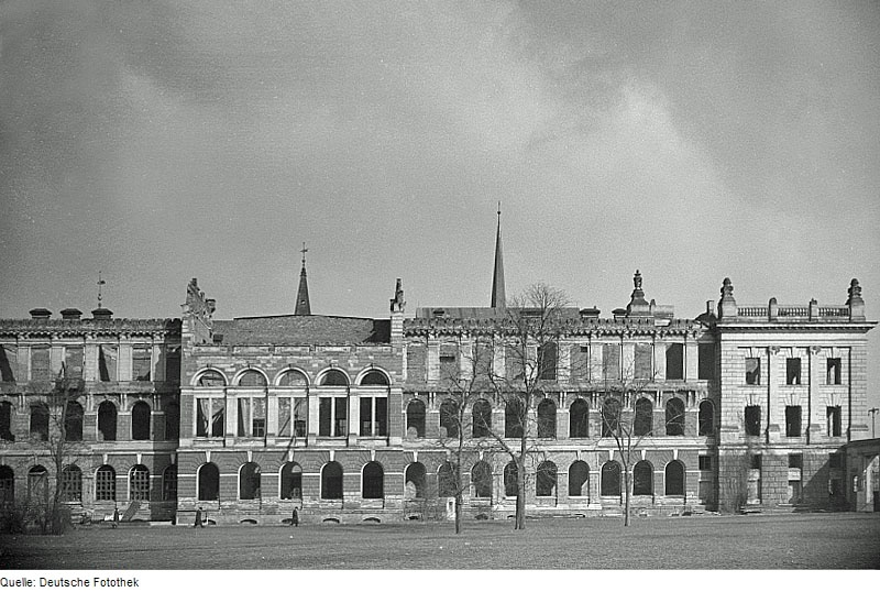 Original image description from the Deutsche Fotothek Blick auf die Ruine des Johanneums, rechts Südgiebel des zertörten Augusteums mit dem angrenzenden Schinkeltor